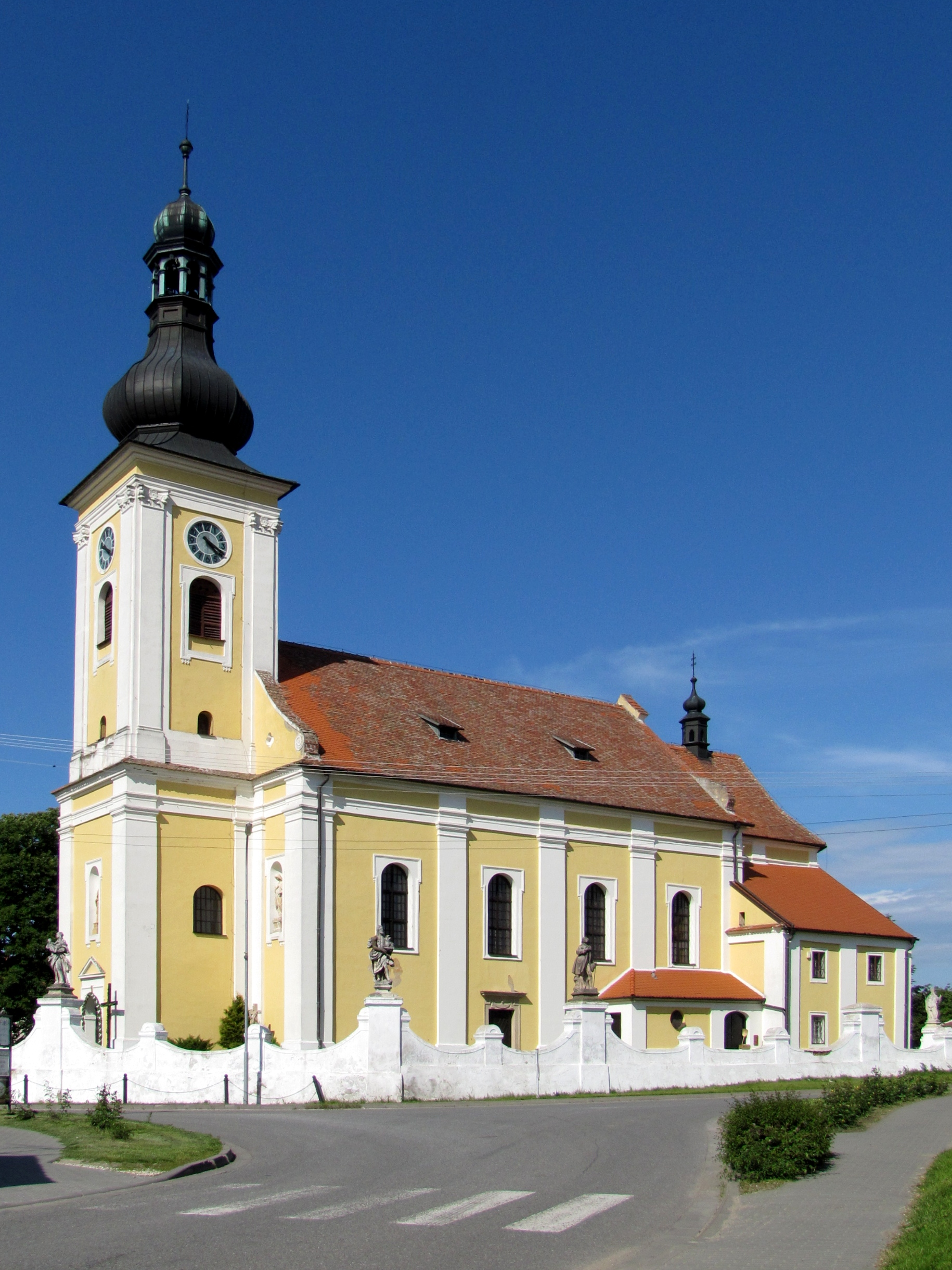 Barokní kostel Všech svatých v Miloticích, okres Hodonín